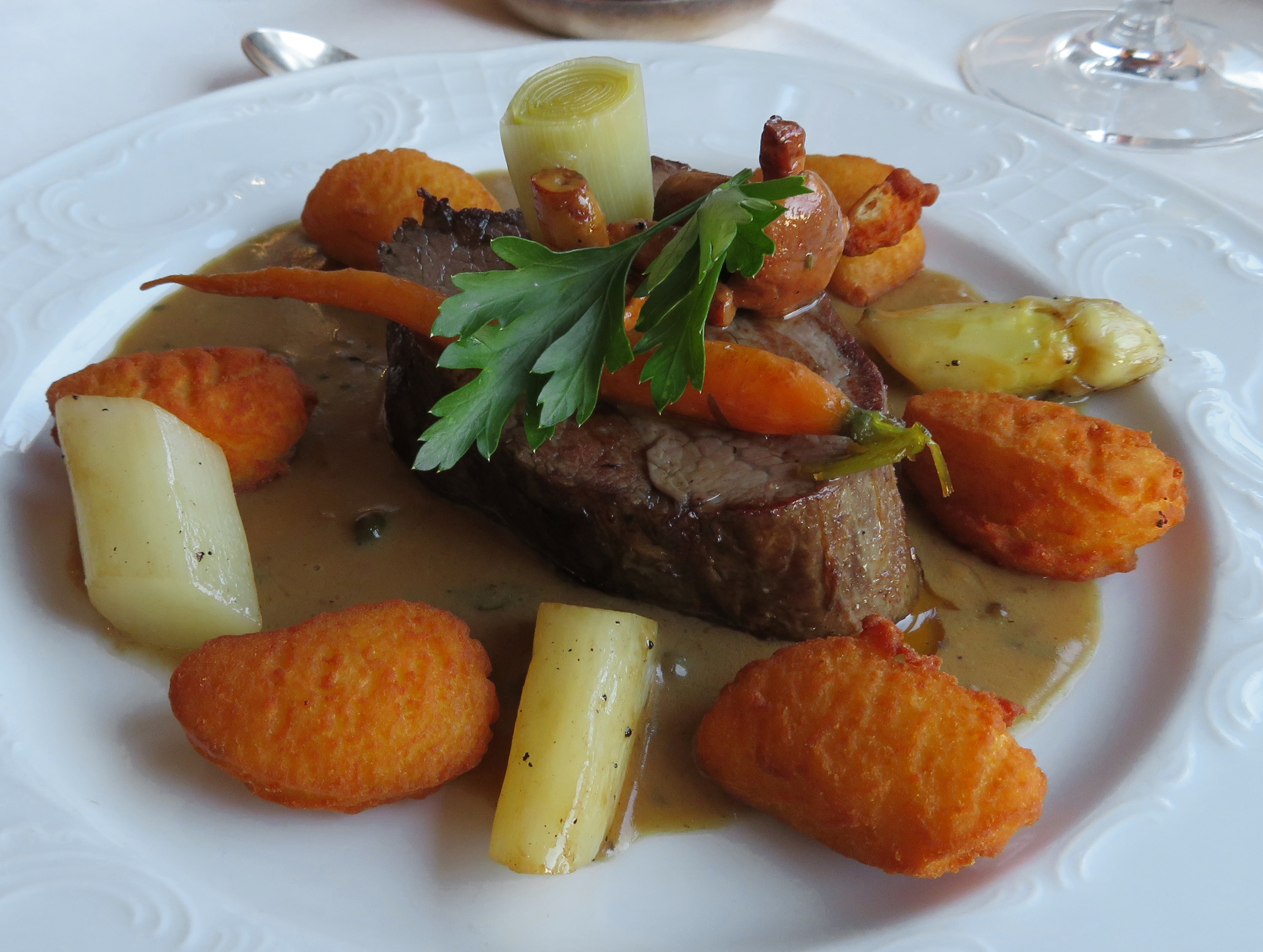 Filetsteak von der Färse mit Pommes dauphine, Gemüse und Pilzen